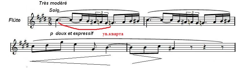 Клод Дебюси - тема от "Следобедът на един Фавн"